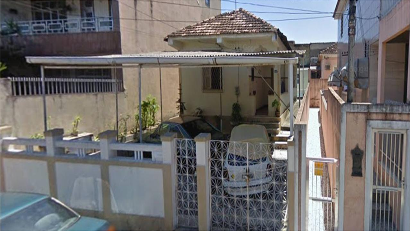 Histórica Casa do Profeta Gentileza